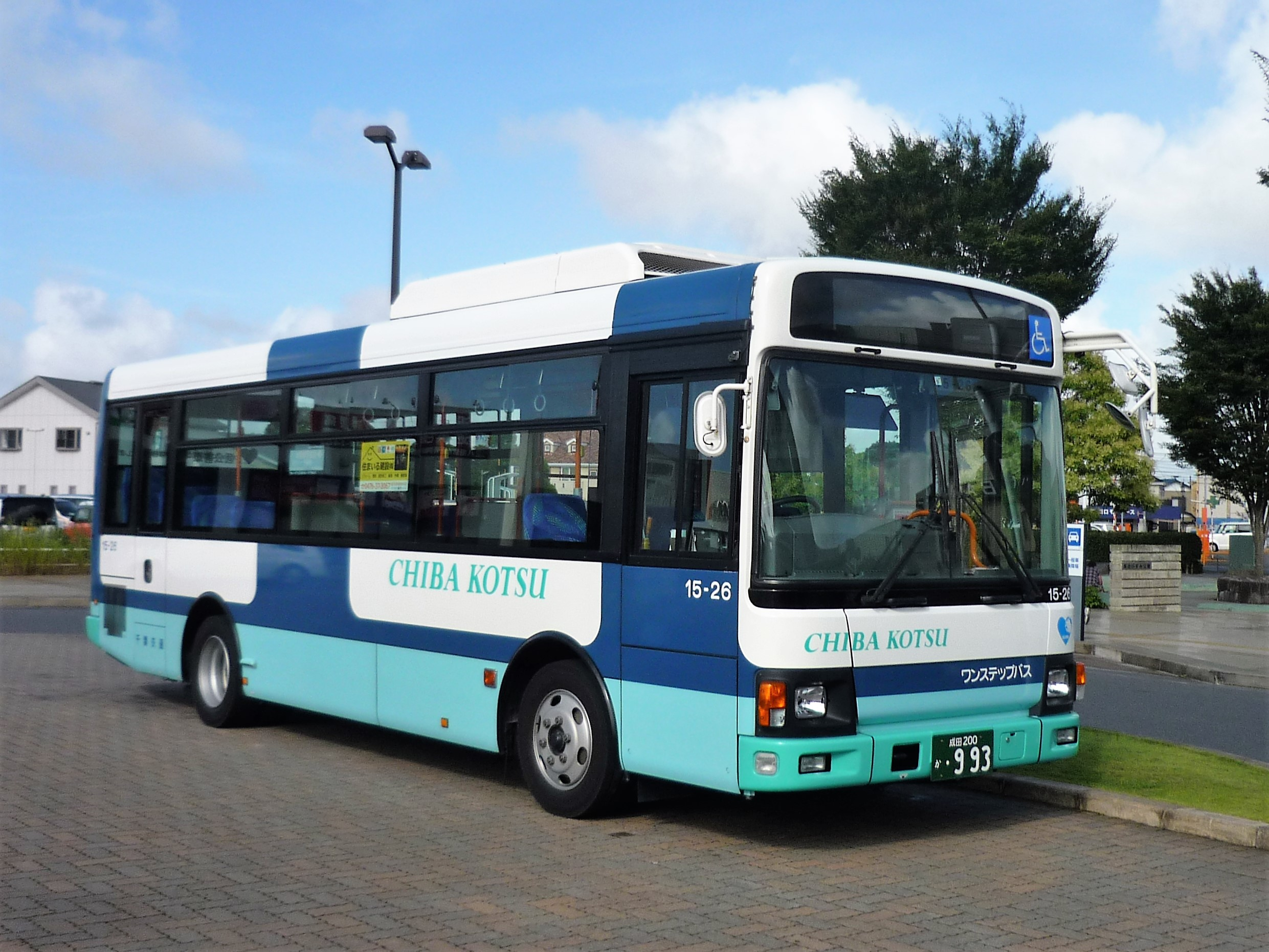 八街駅北口駅前広場に停車中の千葉交通バス Panasonic Lumix DMC-FS3